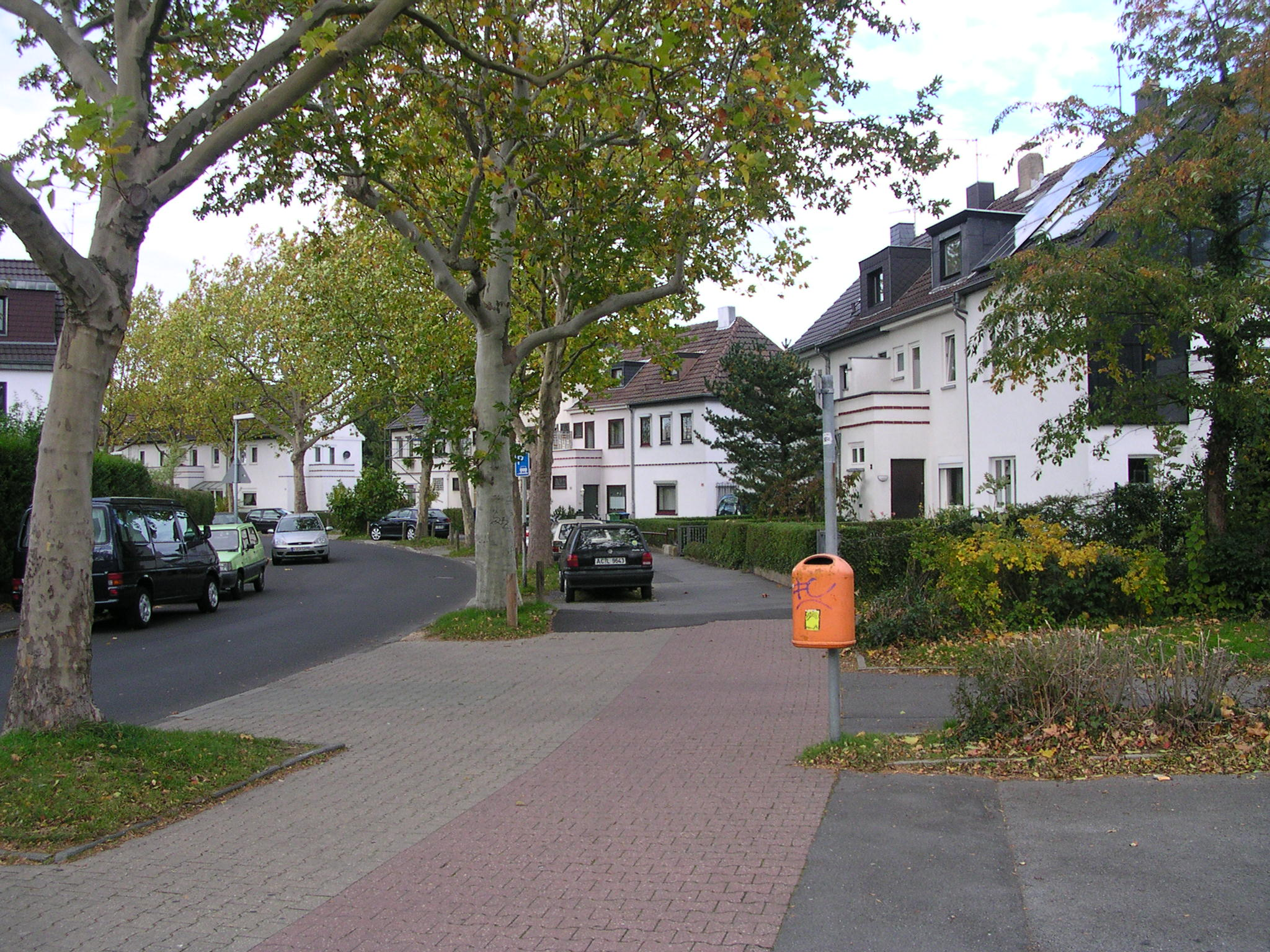 Siedlungsbau aus der Weimarer Republik in Aachen-Burtscheid, Im Gillesbachtal